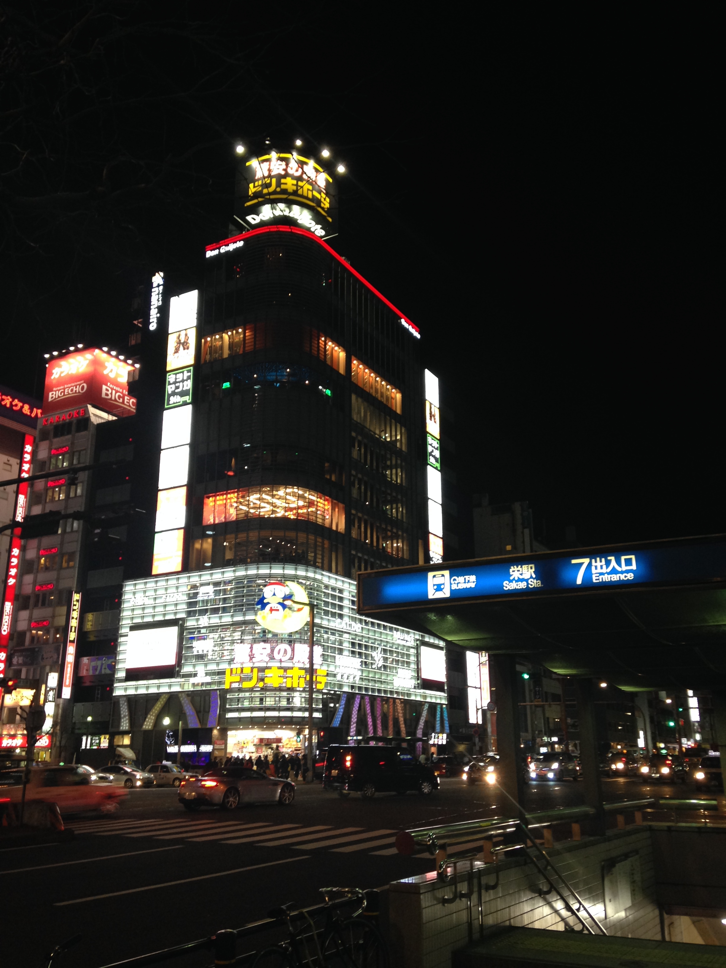 栄駅7番出入り口付近の夜景